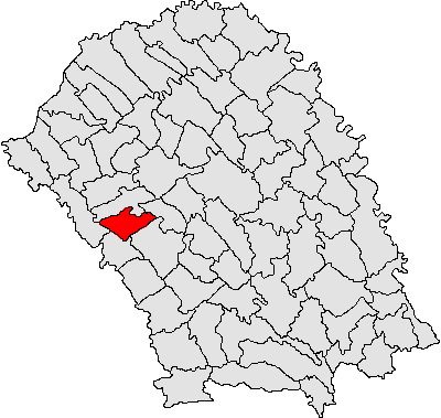 Categorie:Hărţi ale judeţului Botoşani